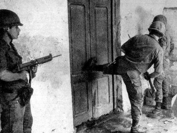 Operativo Independencia para desarticular al ERP. Tucumán, Argentina.